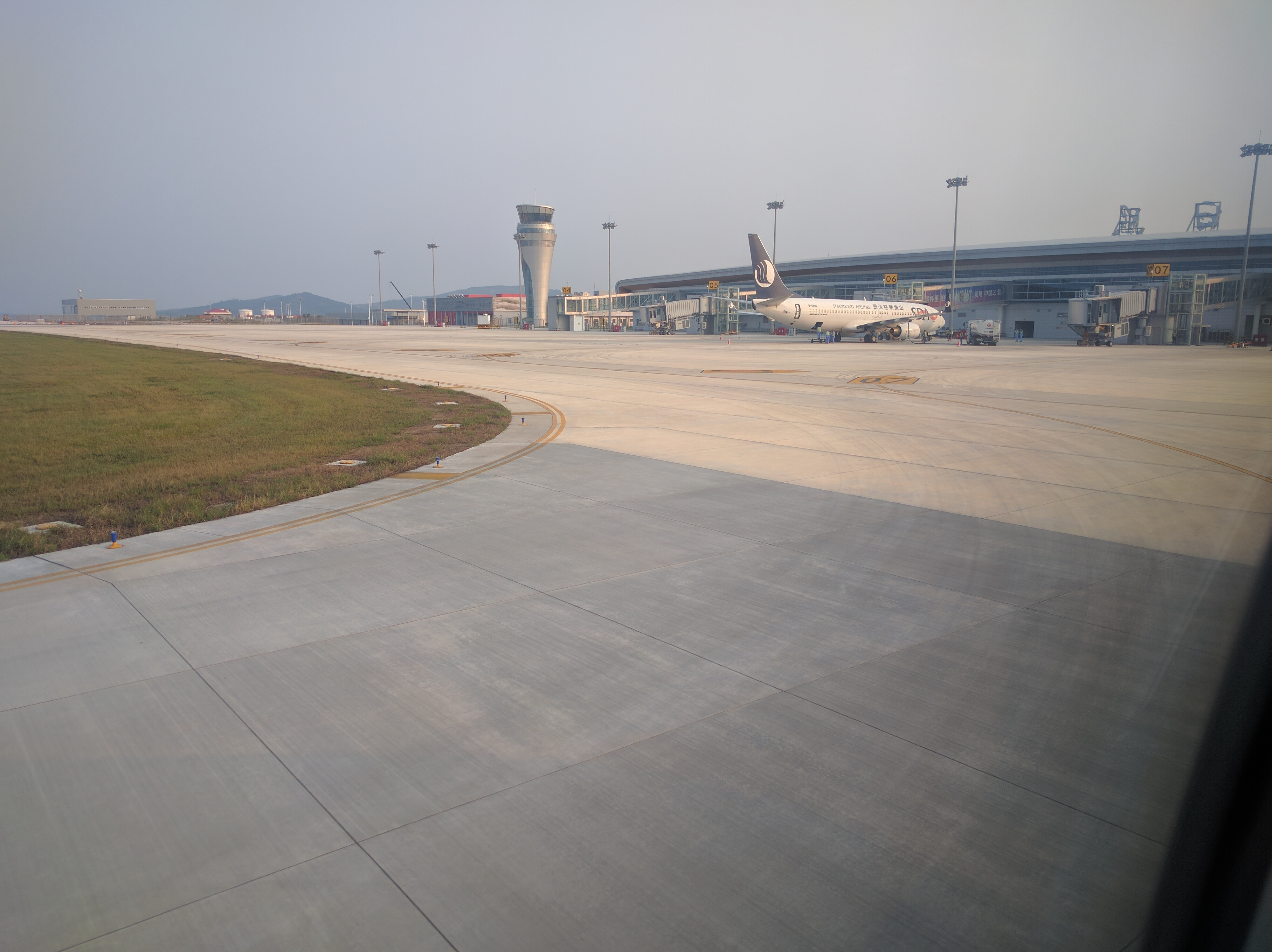 日照山字河机场